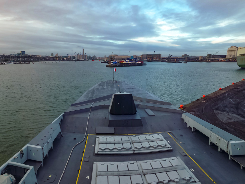 Le port de Dublin, l'Irlande accueille la Provence le 14 janvier 2017